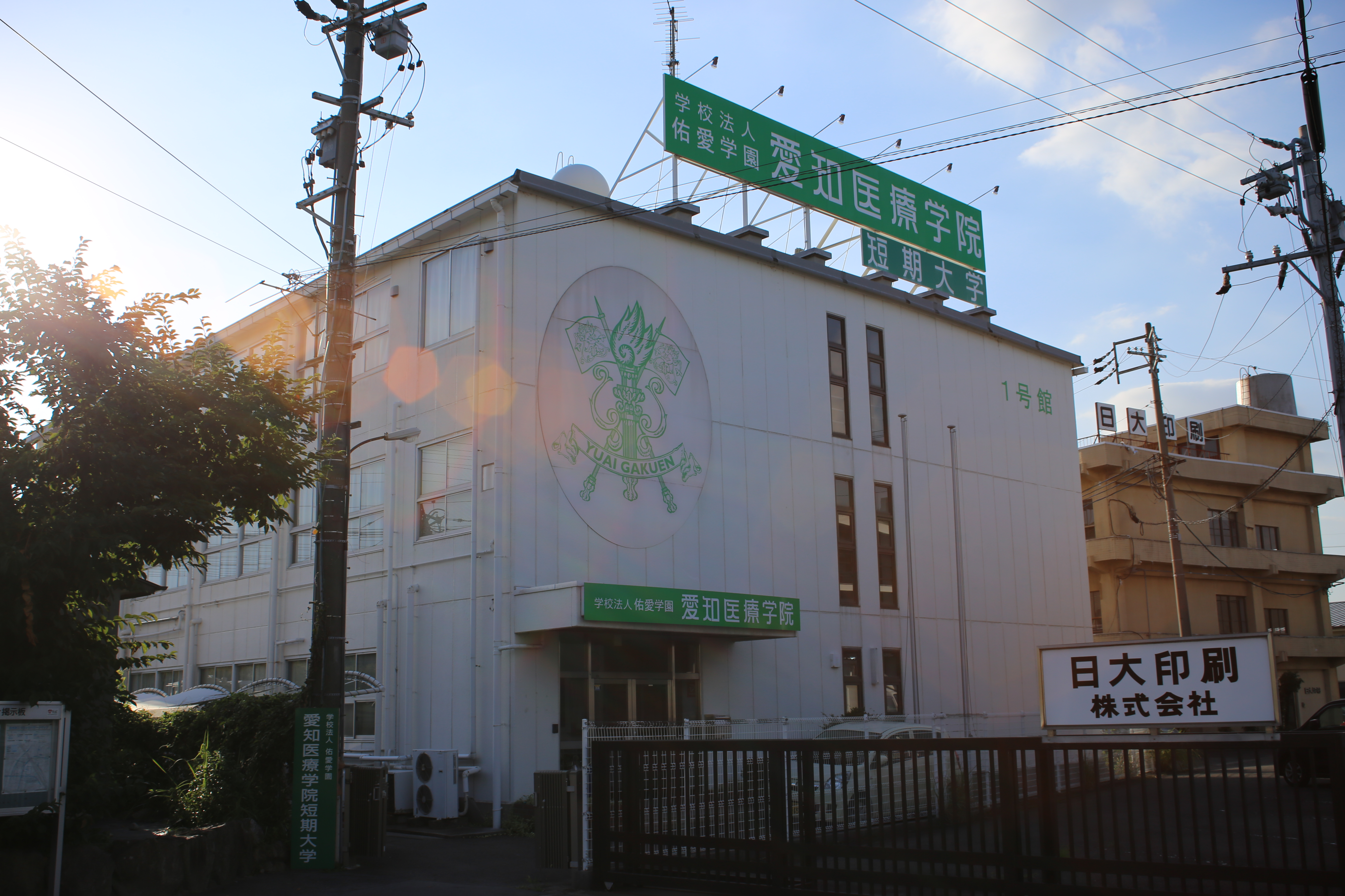 愛知県清須市清洲田中町の愛知医療学院短期大学城南キャンパスを南側公道東側より撮影